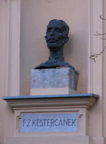 Fran Kesterčanek